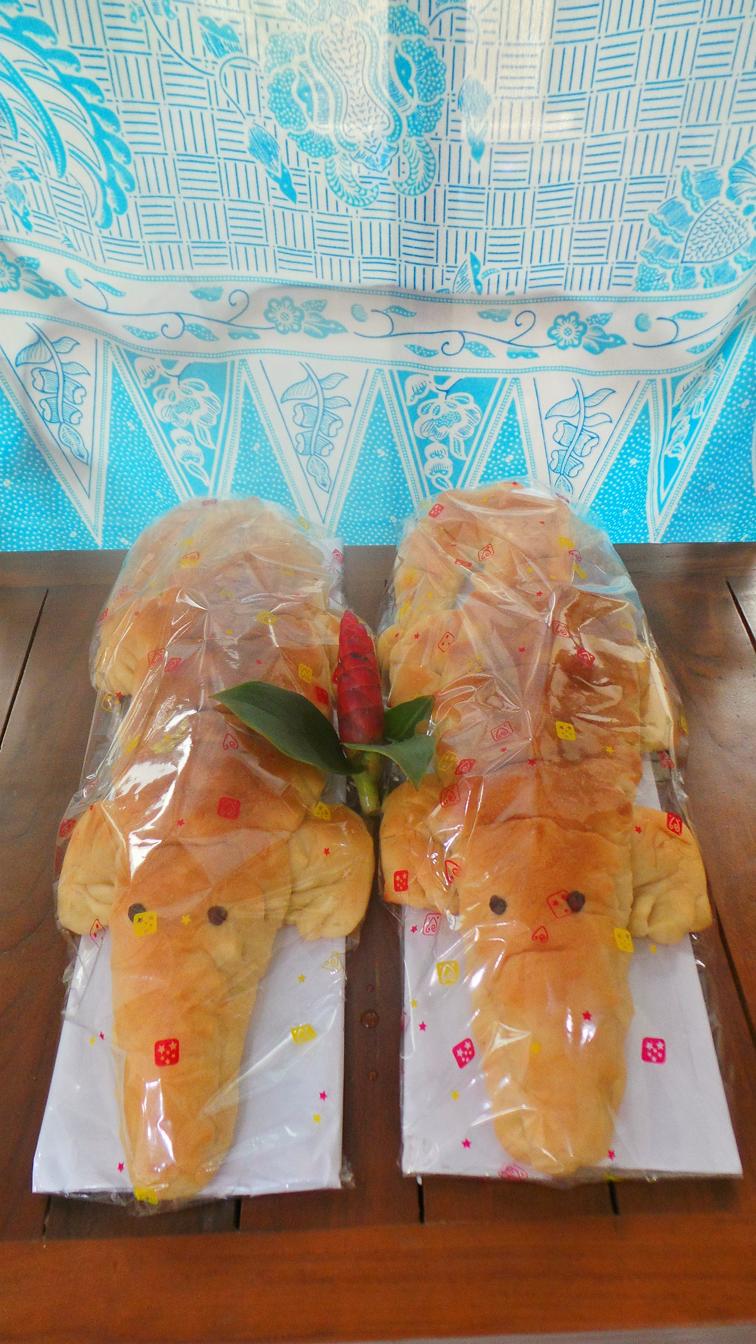 Tidak seperti Roti Buaya pada upacara pengantin Betawi tempo dulu, yang tidak untuk dimakan, roti buaya mini ini teksturnya jauh lebih lembut, juga ditambah dekorasi tempelan cokelat atau kismis. Roti ini akan dibagikan kepada tetamu di pernikahan Betawi